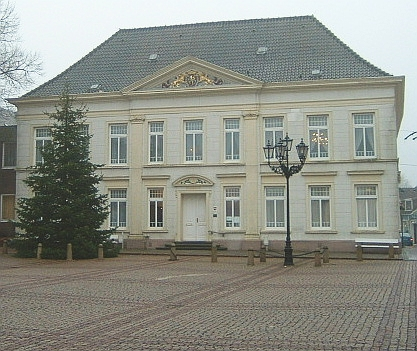 Barockes Rathaus in Esens zur Weihnachtszeit (Tannenbaum).